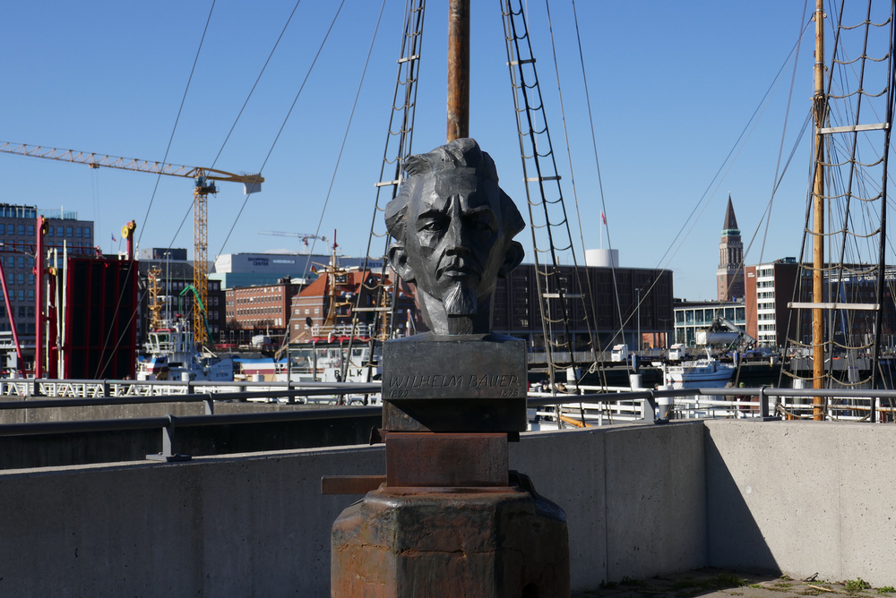 Büste Wilhelm Bauer (Ingenieur) am neuen Standort in Kiel am Germaniahafen, mit dem Westufer im Hintergrund, am Tag der Aufstellung.